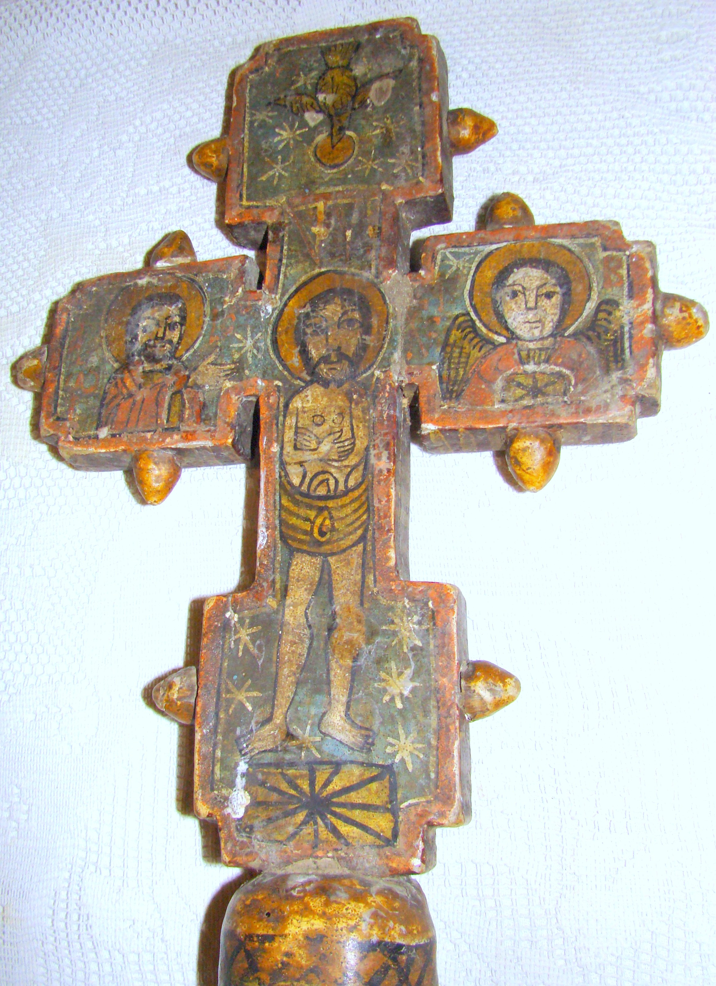 Biserica de lemn „Sfântul Nicolae” din Bădeni, județul Cluj